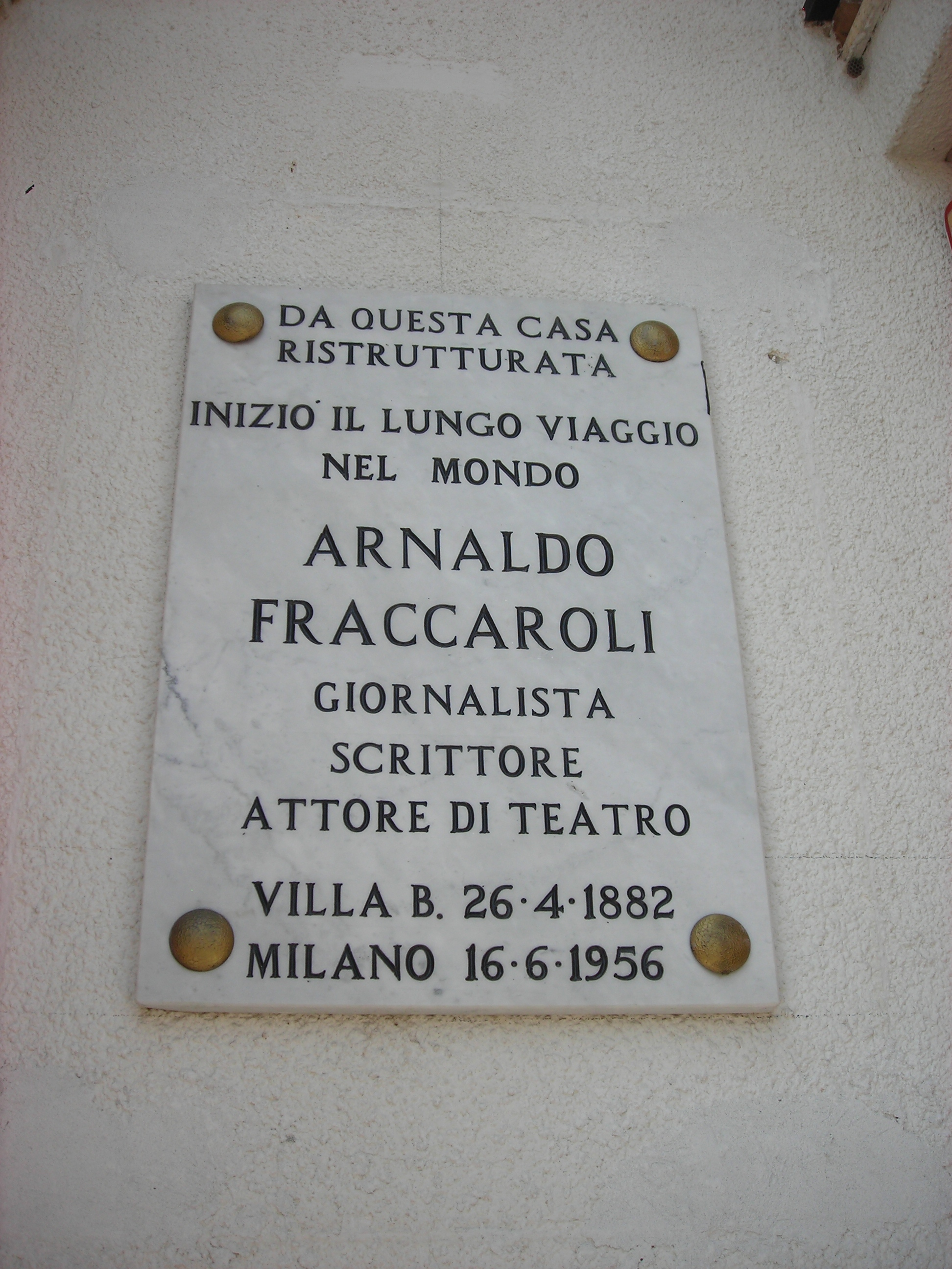 Lapide commemorativa sulla casa di Arnaldo Fraccaroli a Villa Bartolomea